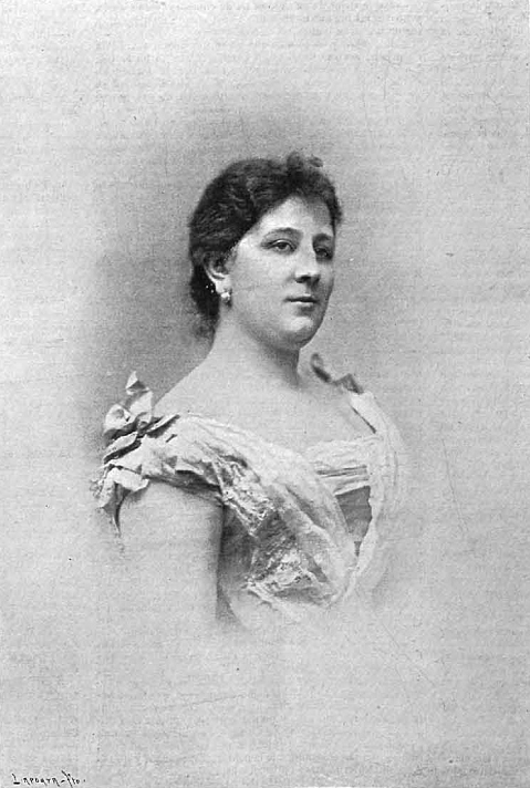 Retrato de Concepción Benjumea de Polavieja, obra del fotógrafo Edgardo Debás, recogido en la revista española La Ilustración Española y Americana.